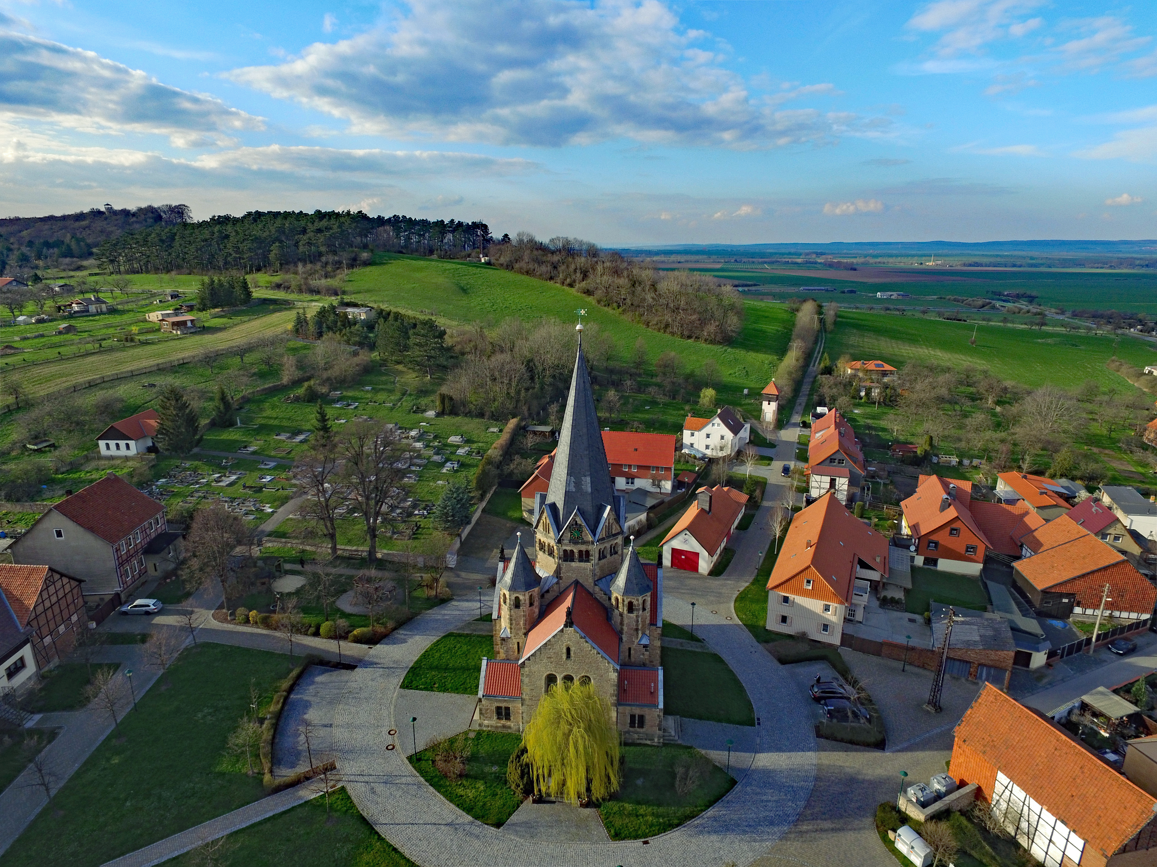 Dorfkirche Benzingerode 01